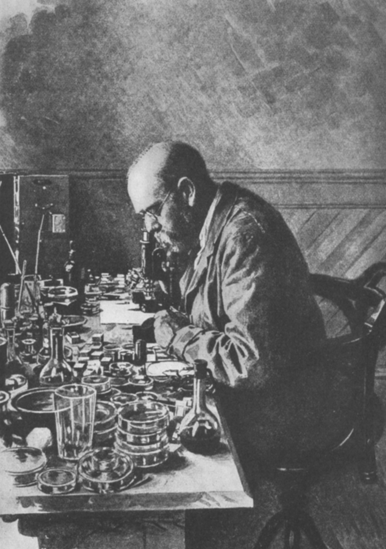 Robert Koch in seine Laboratorium